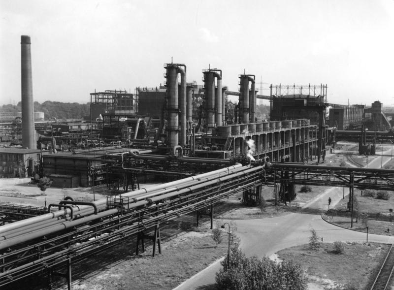 August 1953 Union-Kraftstoffwerk Wesseling bei Bonn Blick von Bau 45 auf Konvertierung